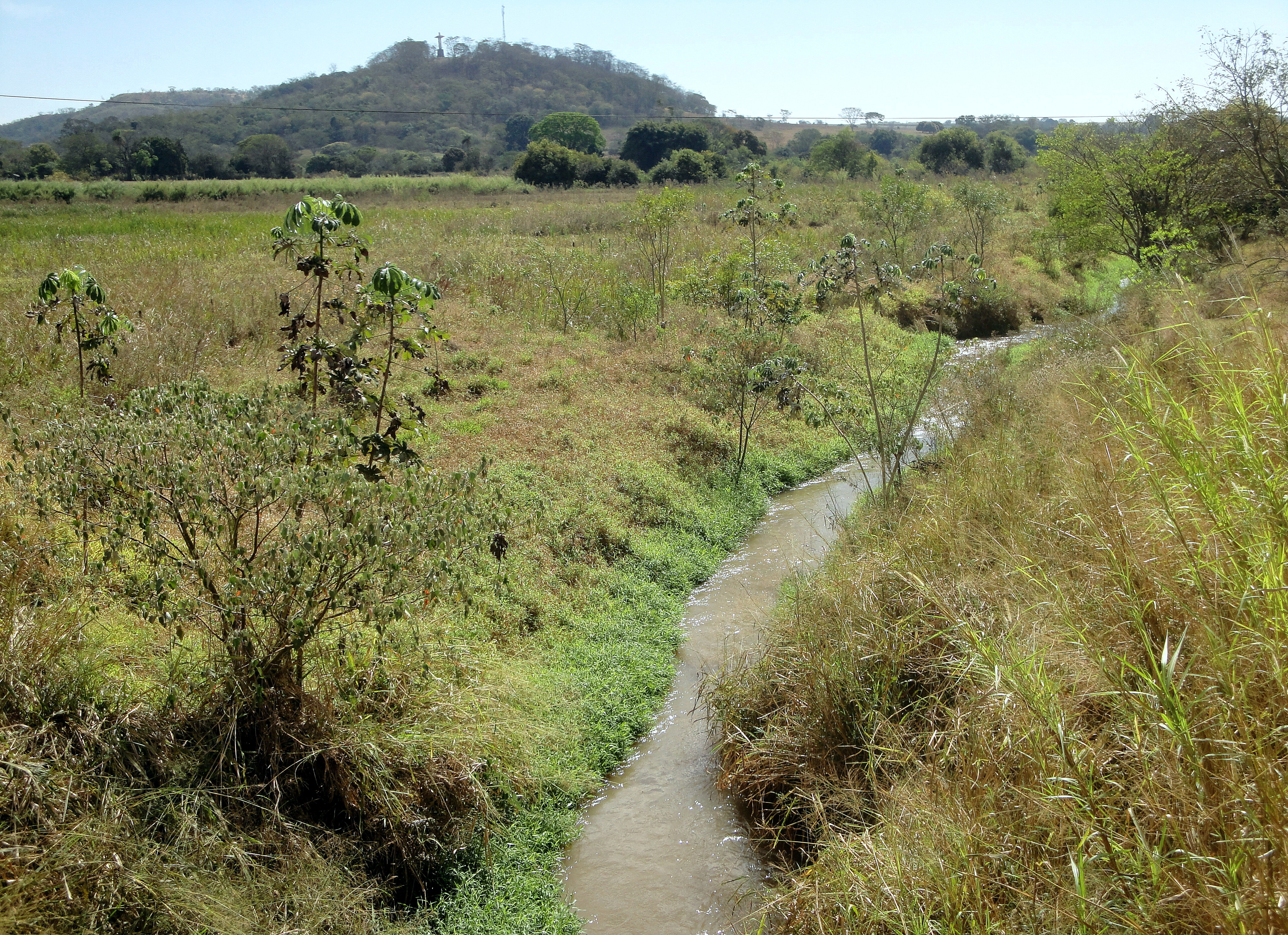 Ribeirão Rancho Queimado indo desaguar no Córrego da Paciência, ao fundo o Morro do Cristo, um dos morros testemunho ao redor da cidade de Rincão